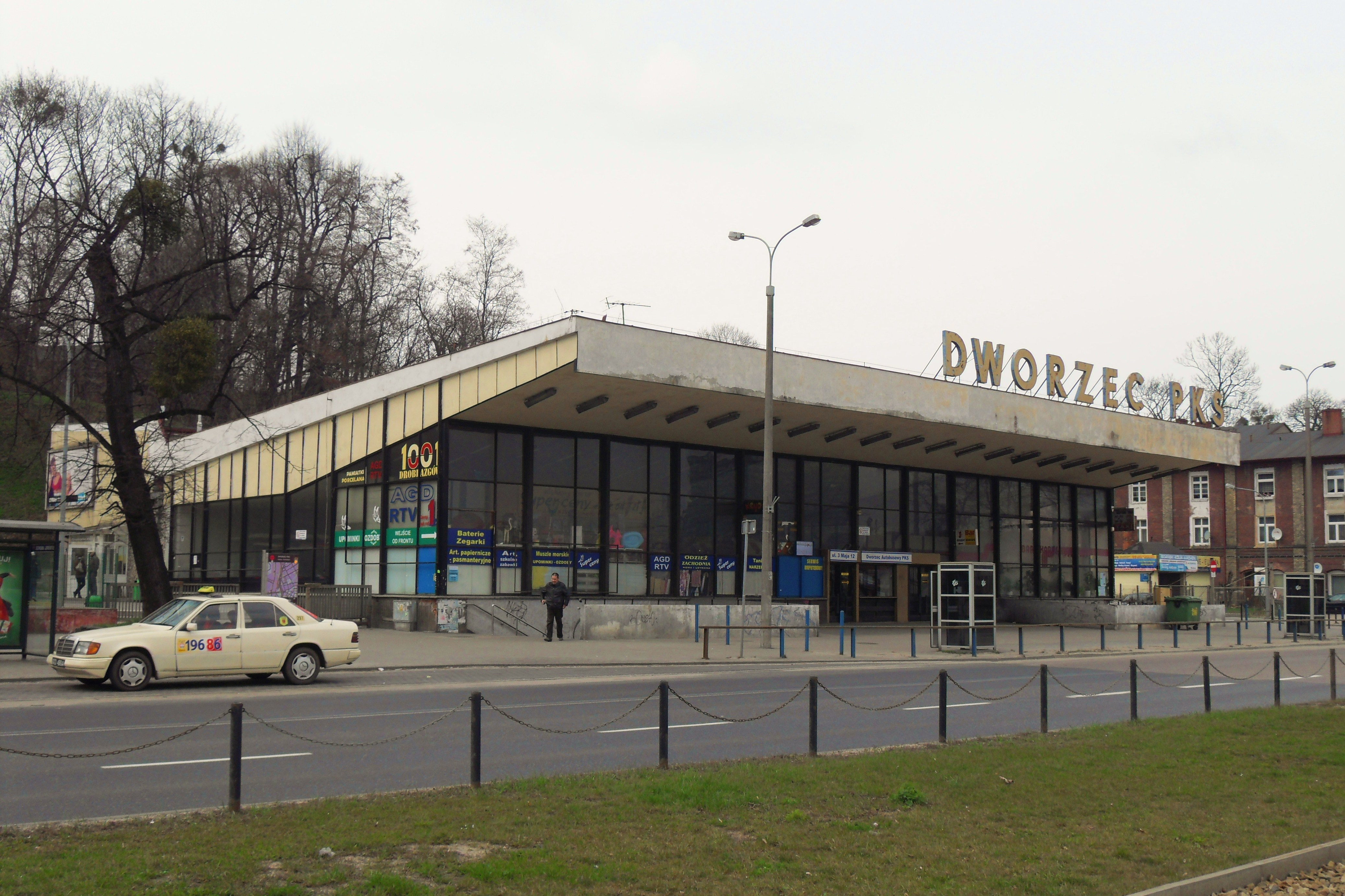 Gdańsk Śródmieście. Dworzec PKS, ul. 3-go Maja 12.